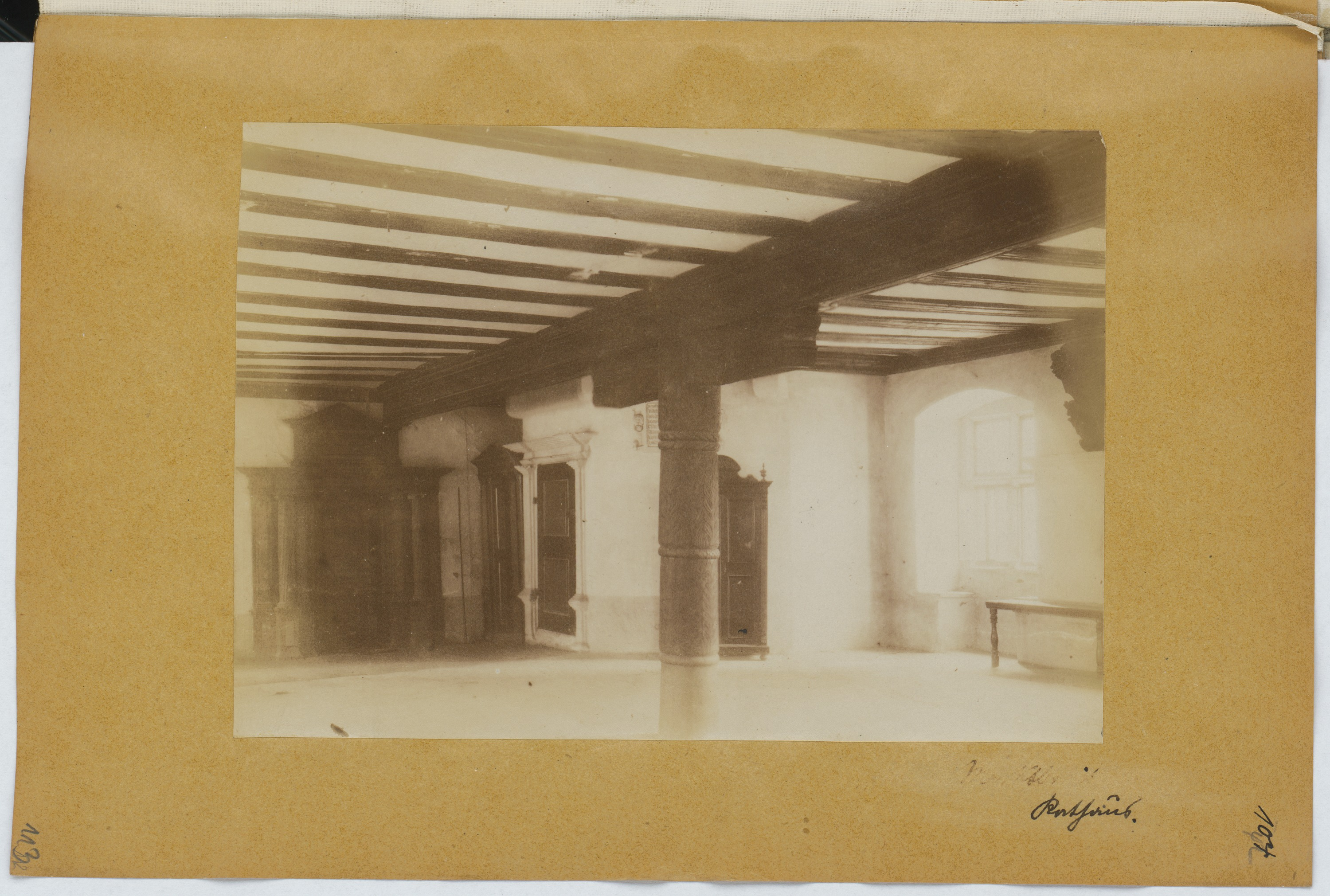 Stiehl Otto (1860-1940), Skizzen- und Fotoalbum 16: Rathaus, Marktbreit: Innenansicht. Foto auf Papier, (inkl. Scanrand). Architekturmuseum der Technischen Universität Berlin Inv. Nr. 57201,113.